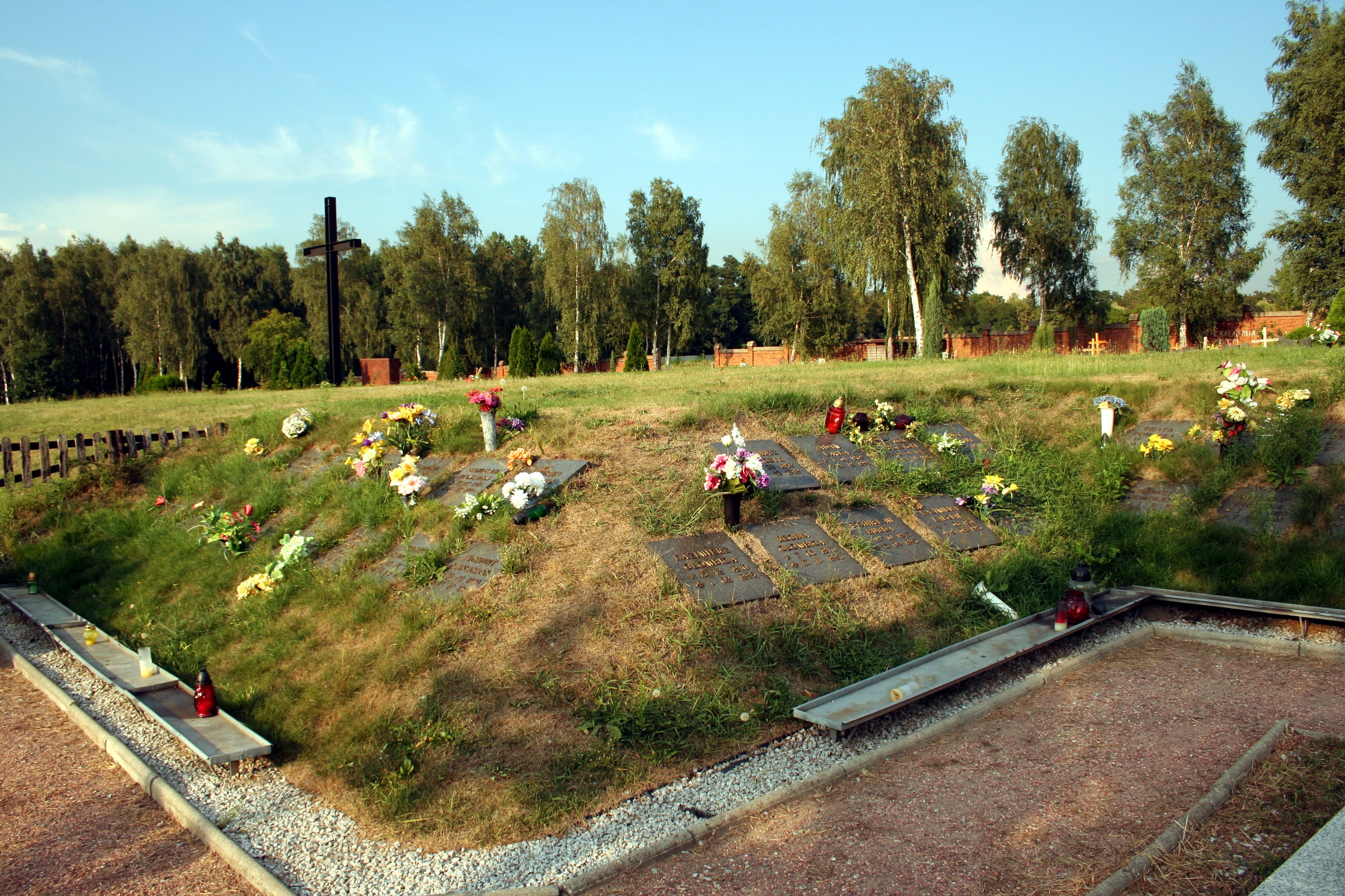 Zbiorowa mogiła utworzona dla zmarłych, których groby zostały podmyte podczas powodzi w 1997 roku - fragment. Cmentarz komunalny w Rybnik